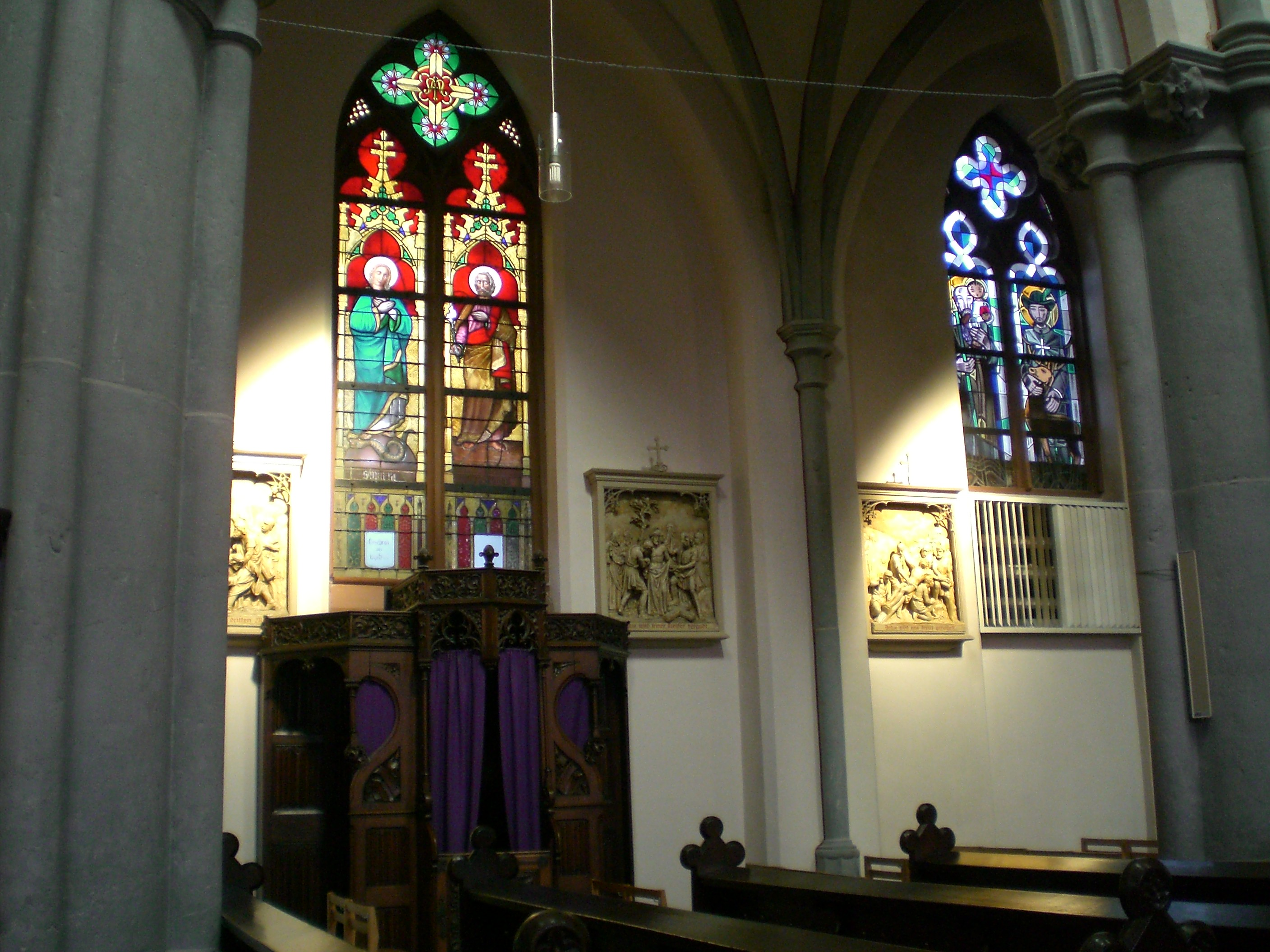 Eupen, Belgien 2011